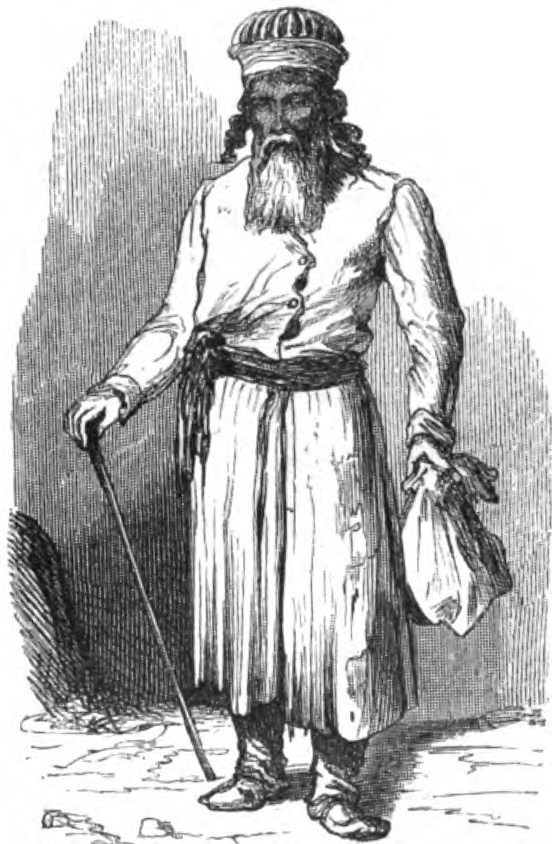 Juif à Bucharest